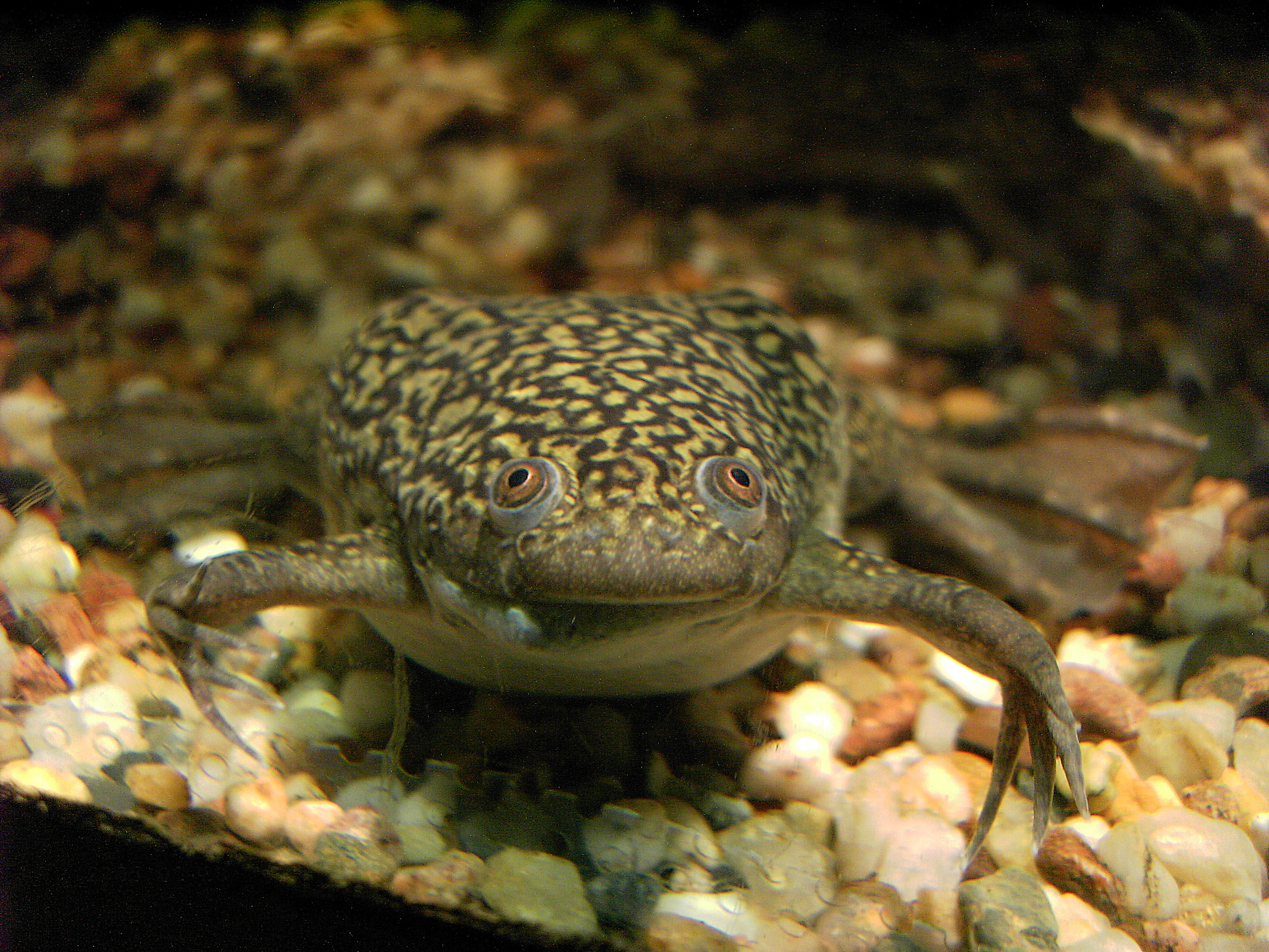 Frontalansicht eines Gemeinen Krallenfrosches (Xenopus laevis)aus Afrika